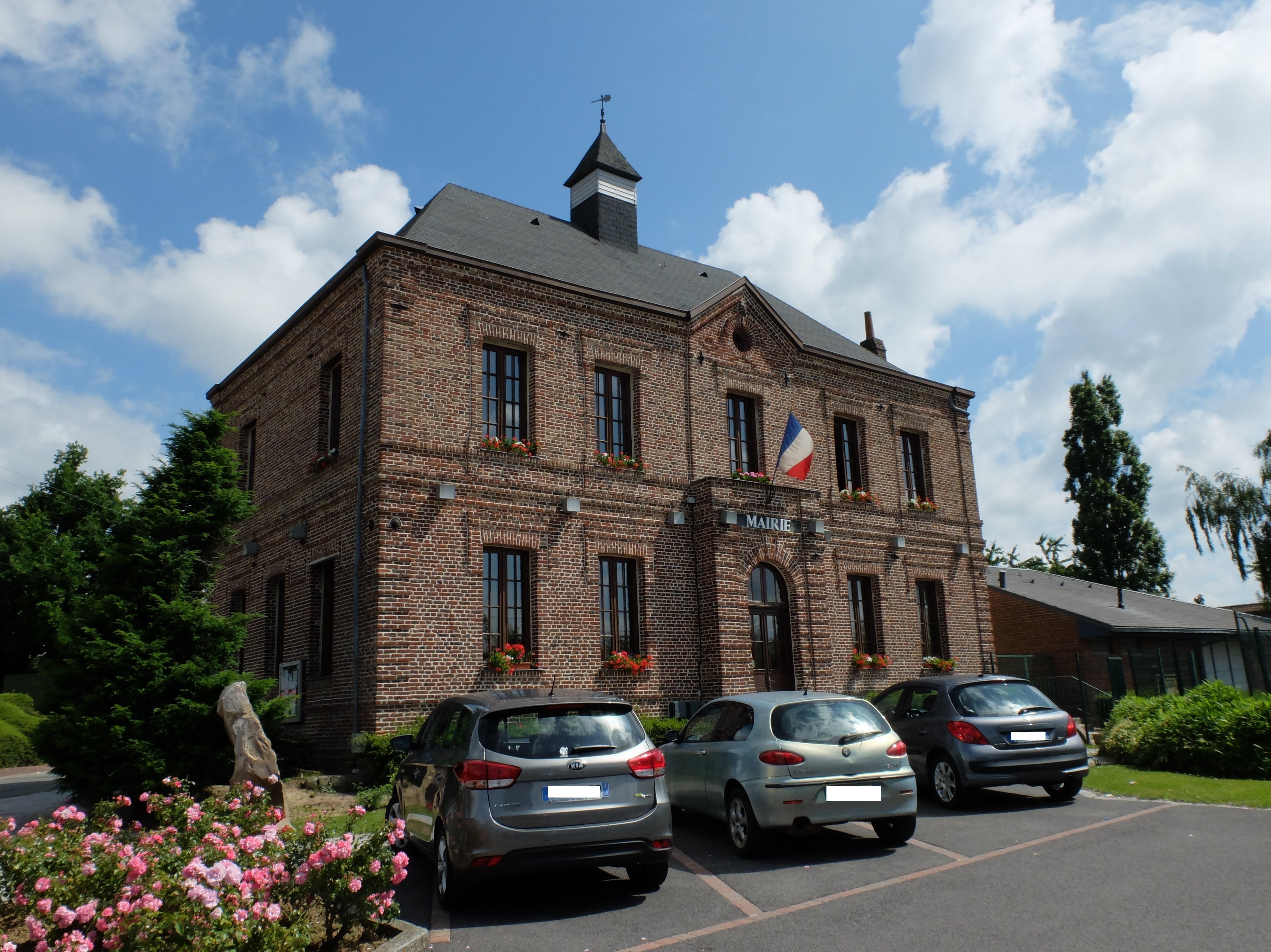 Vue de la mairie d'Estrées, dans le Nord.